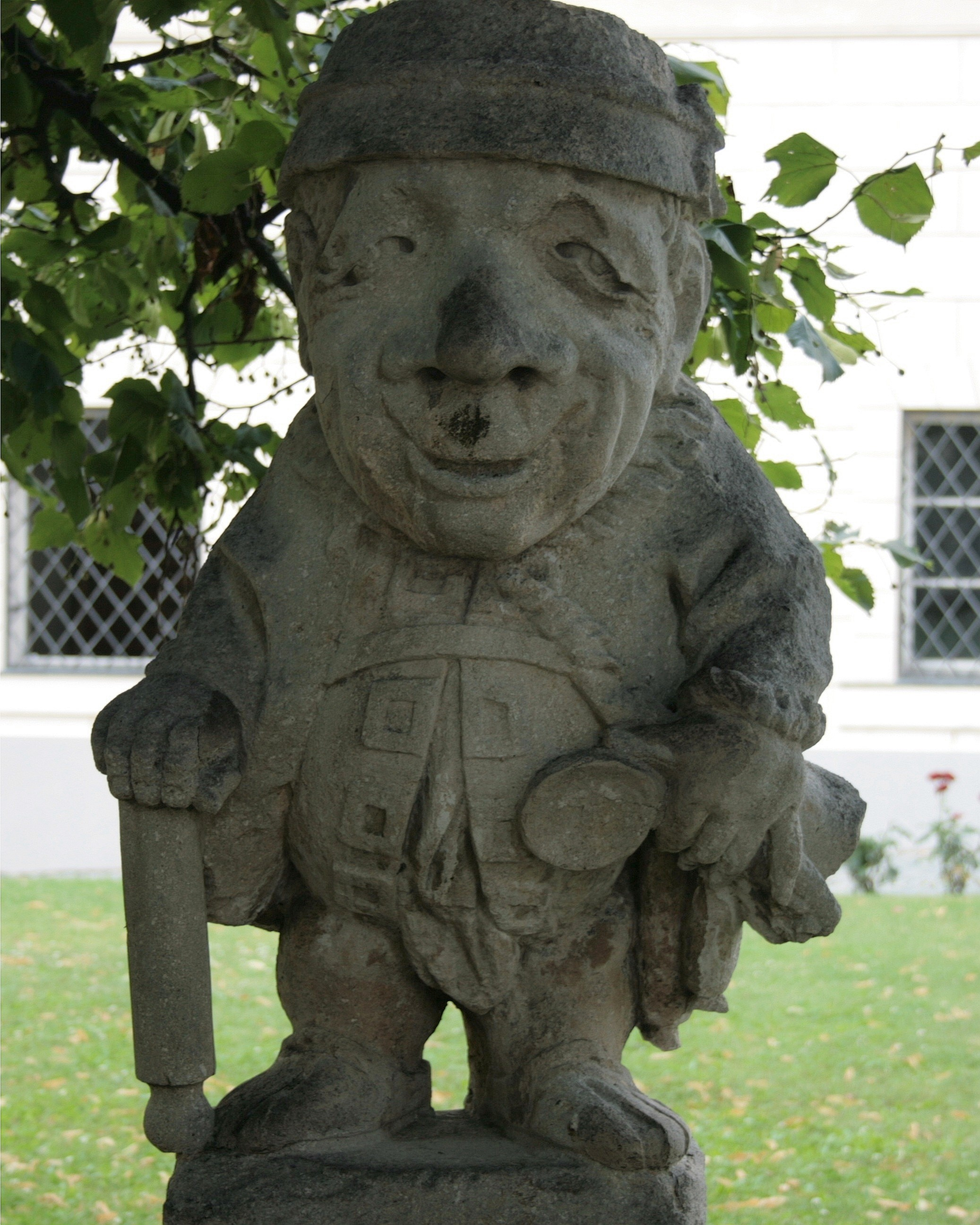 Nutsch-Moloff. Ein fürnehmer Lappländischer Landtherr und Obrister Landt Kuchlmeister in der Insl Deserta. Eine Zwergenfigur im Hof von Schloss Lamberg, angefertigt 1720 von Johann Baptist Wuntscher nach einer Vorlage aus dem Anfang des 18. Jahrhunderts erschienenen II Callotto resuscitato od. neu eingerichtes Zwerchen Cabinet. Dieses geht wiederum zurück auf Jacques Callots Varie figure gobbi di Jacobo Callot (1622)[1] Ursprünglicher Ort war der Zwergengarten von Stift Gleink, seit der Oberösterreichischen Landesausstellung 1980 befindet sich die Figur zusammen mit weiteren, um den Hofbrunnen angeordneten, im Lamberger Schlosshof.[2] Im Zuge der Neugestaltung des Schlosshofes und der Restaurierung des Brunnens 2014/15 wurden auch die Zwerge restauriert und anschließend in anderer Anordnung wieder um den Brunnen herum aufgestellt. Das Bild zeigt den Zustand der Figur vor der Restaurierung.